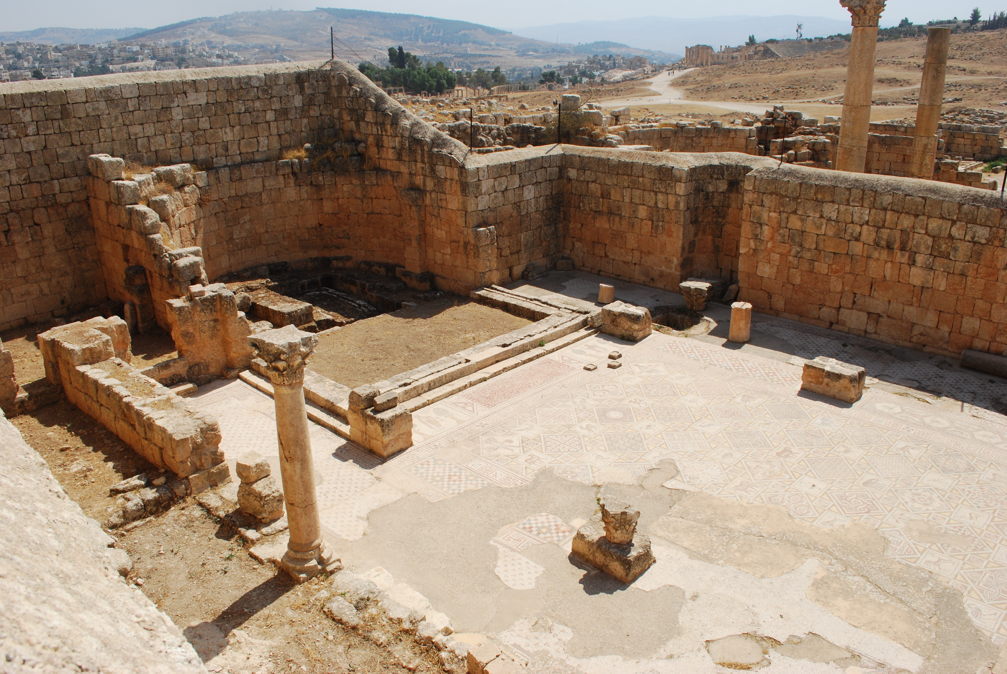 Eglise des saints Côme et Damien à Jerash.